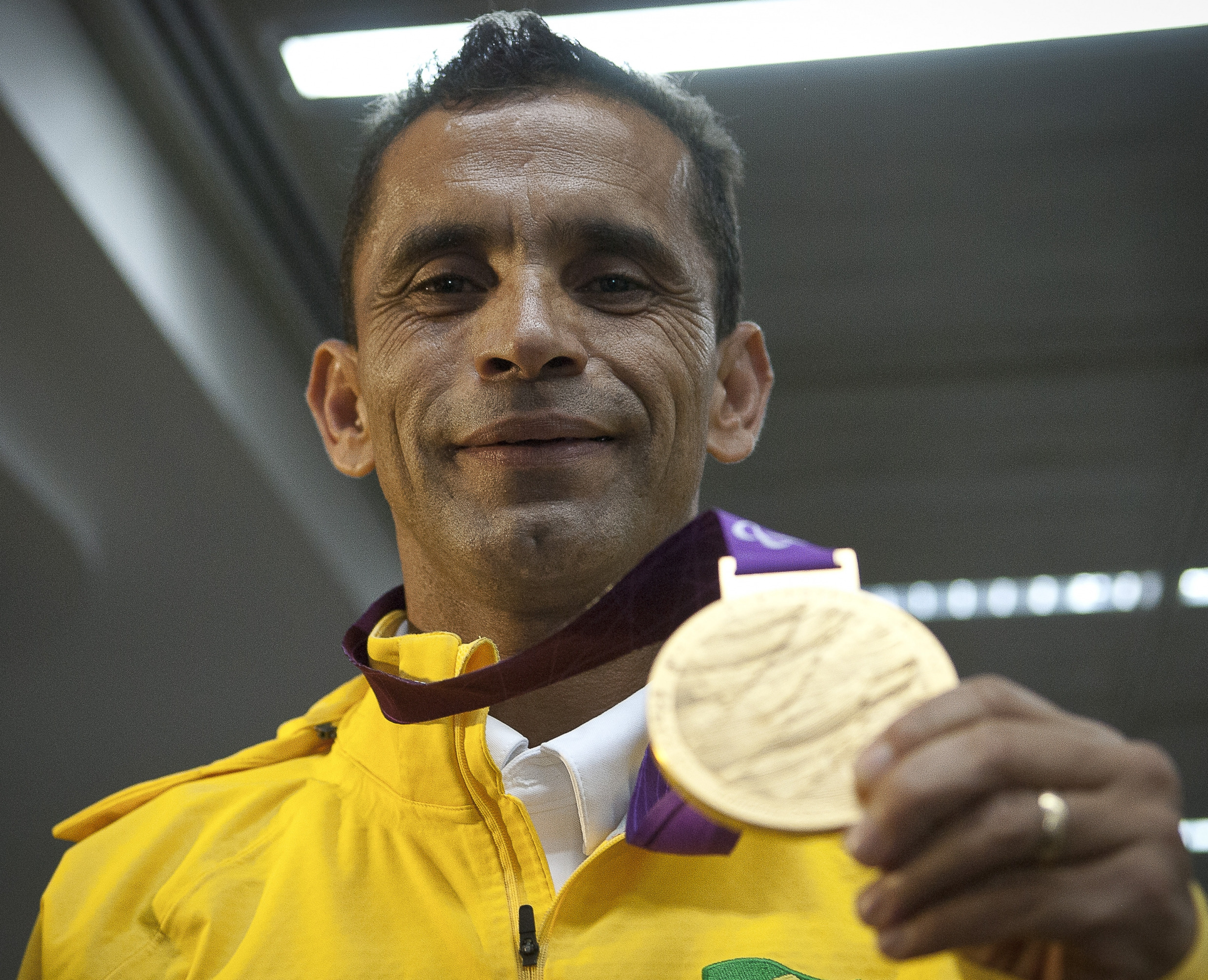 São Paulo - O atleta Tito Sena, ouro na maratona T46, desembarca no aeroporto de Guarulhos, em São Paulo